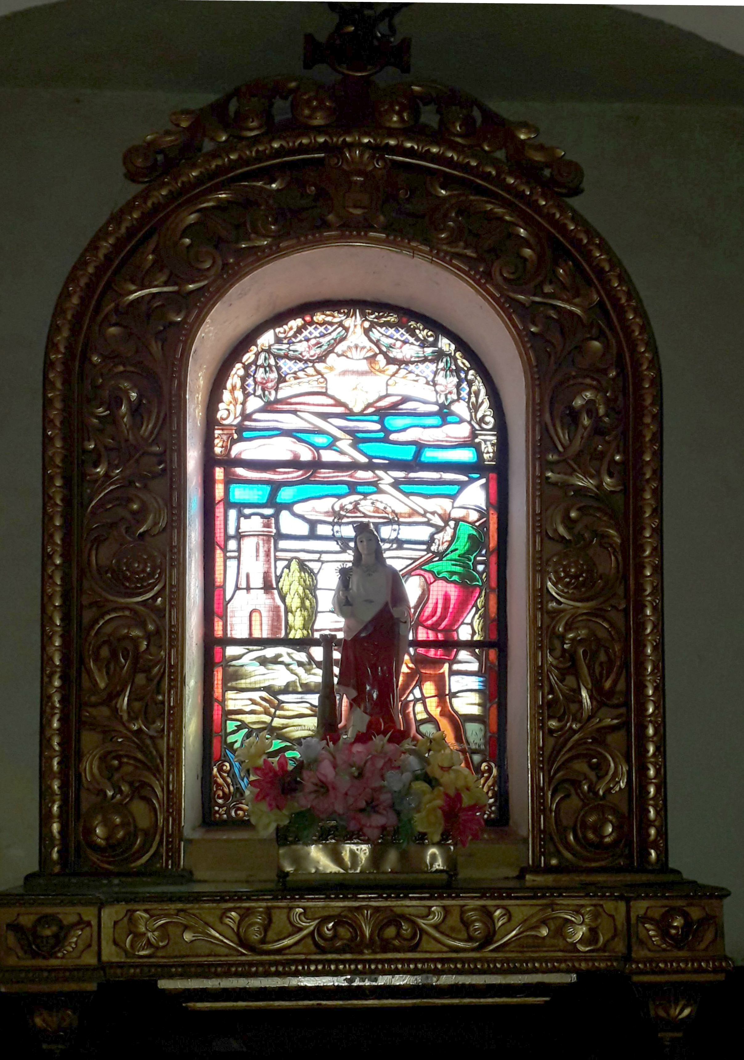 Capilla de Santa Bárbara de la Parroquia de San José de Jatibonico y Arroyo Blanco en Cuba.